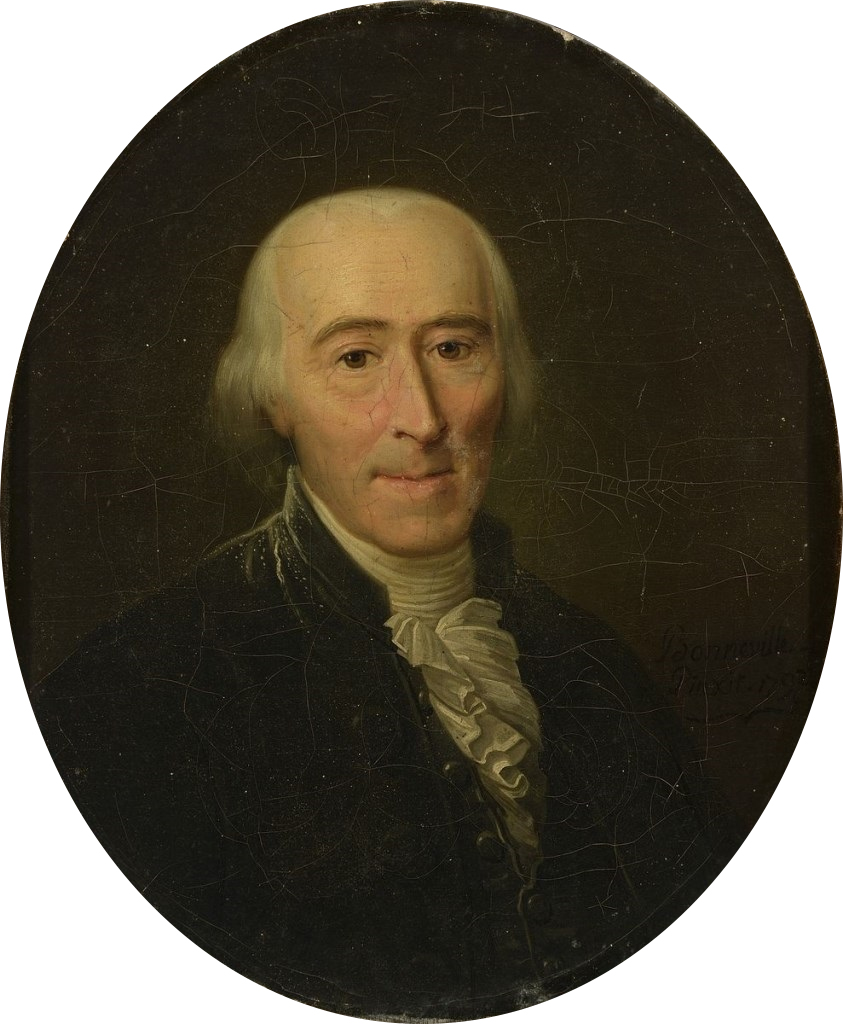 Roland de la Platière, portrait peint par François Bonneville, 1792.